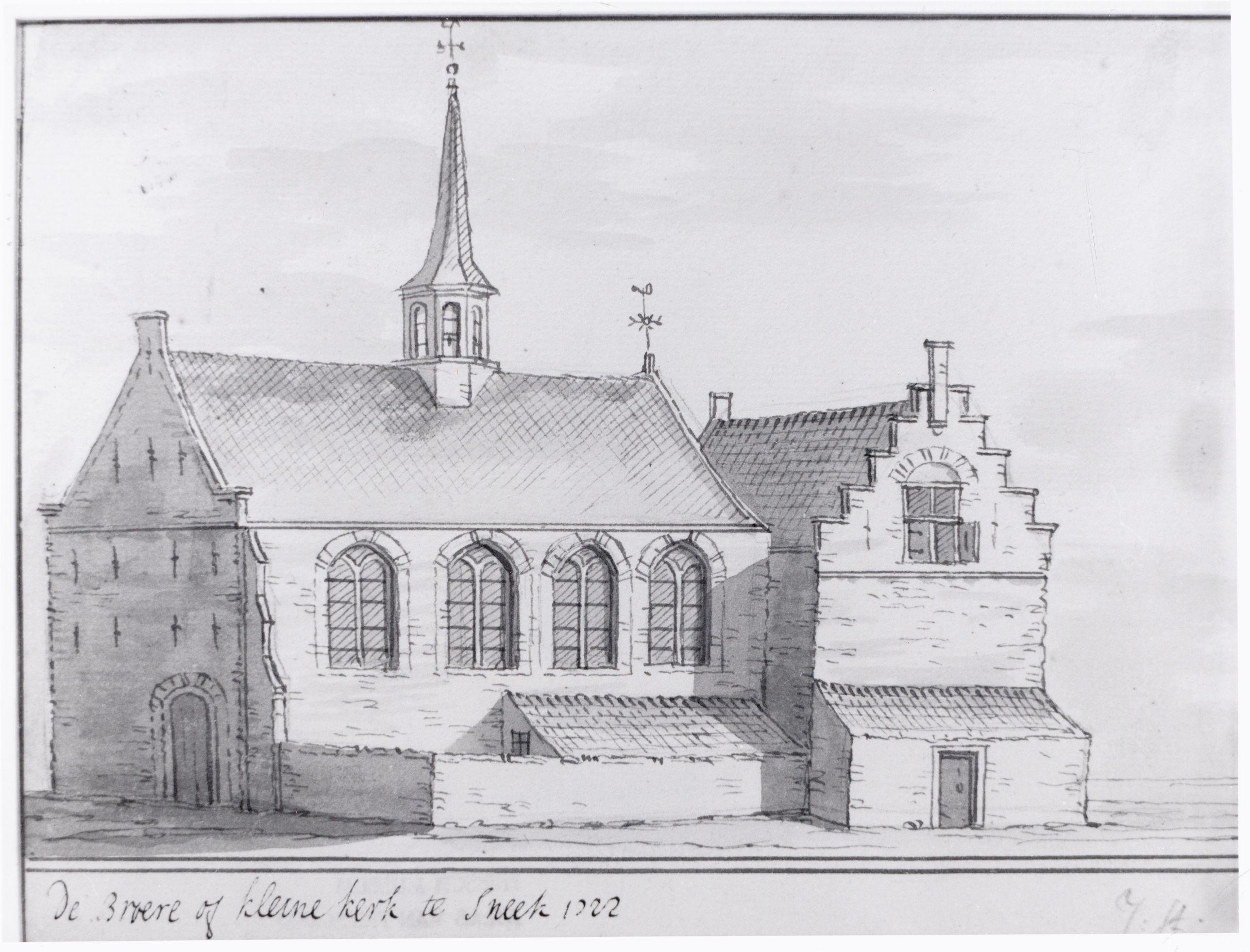 Kleine- of Broere Kerk te Sneek, 1722.